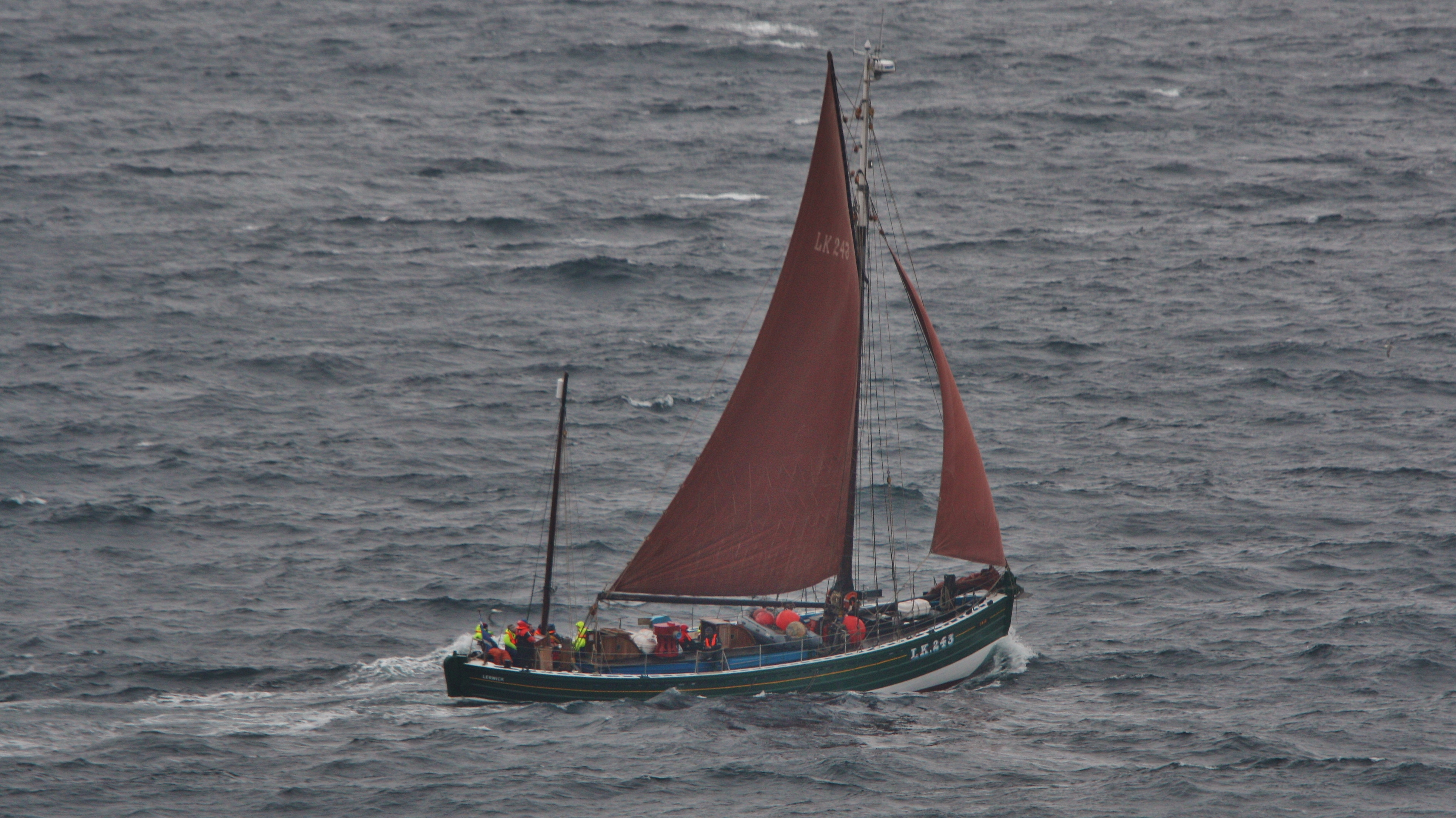 Passing Sumburgh Head